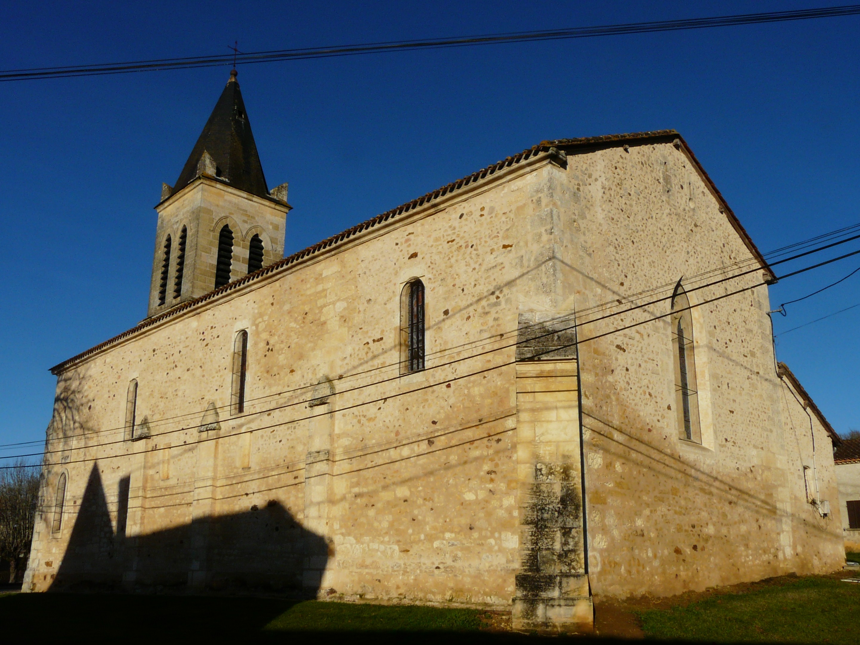 L'église Notre-Dame-de-l'Assomption, Veyrines-de-Vergt, Dordogne, France.